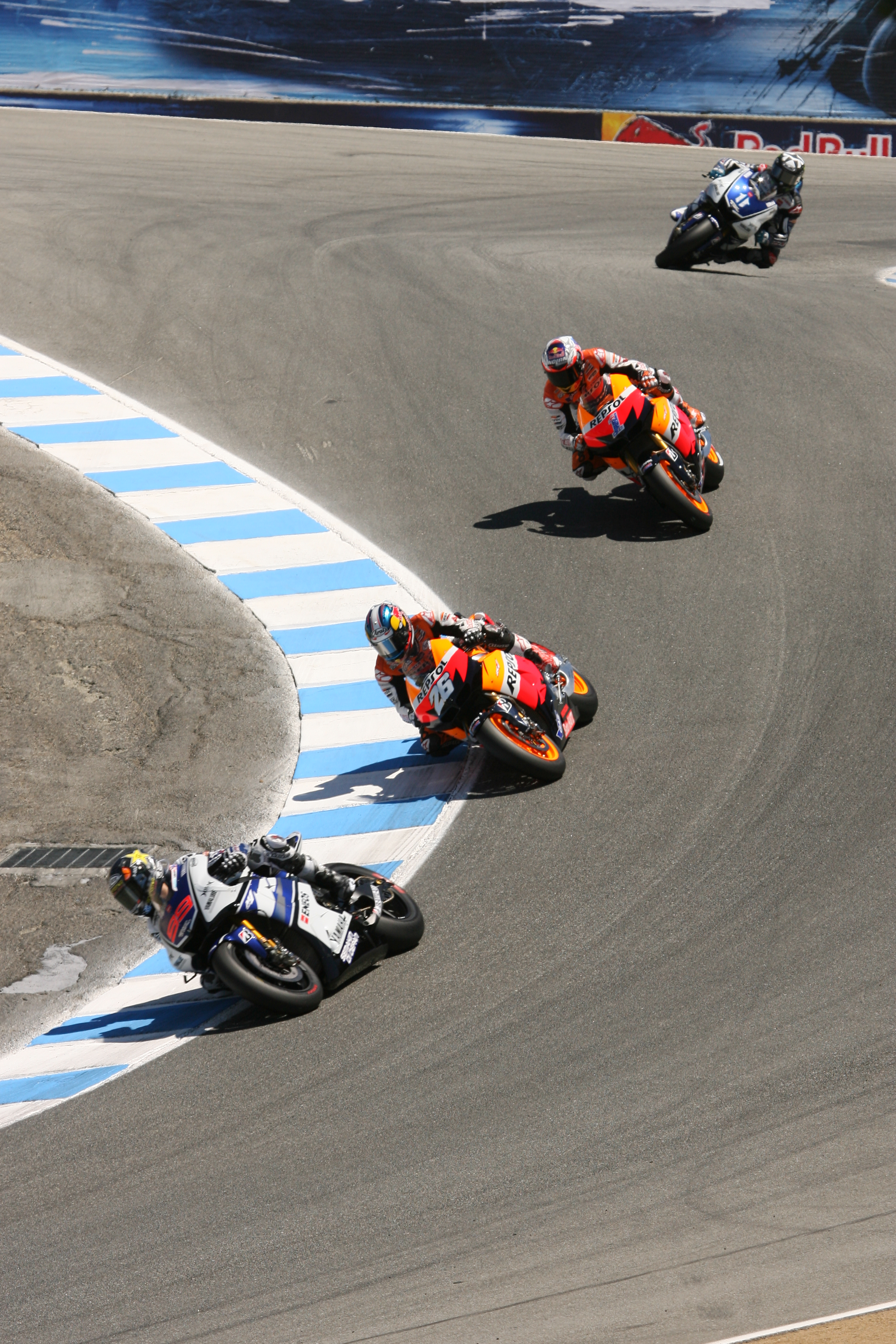 2012 MotoGP Laguna Seca